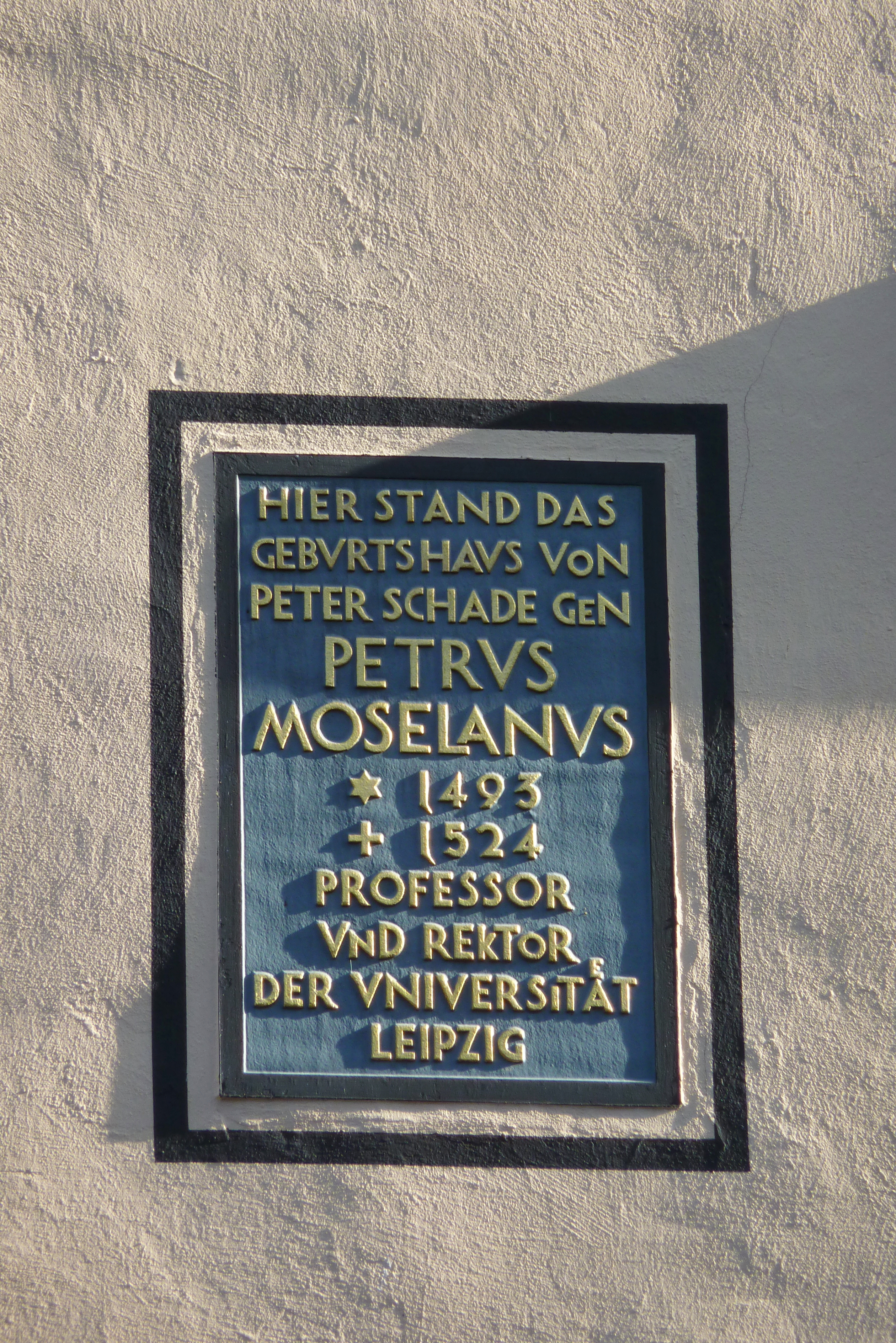 Gedenktafel für Petrus Mosellanus in Bruttig (Ecke Petrus-Mosellanus-Str./Am Moselufer), einem Ortsteil von Bruttig-Fankel im Landkreis Cochem-Zell (Rheinland-Pfalz)